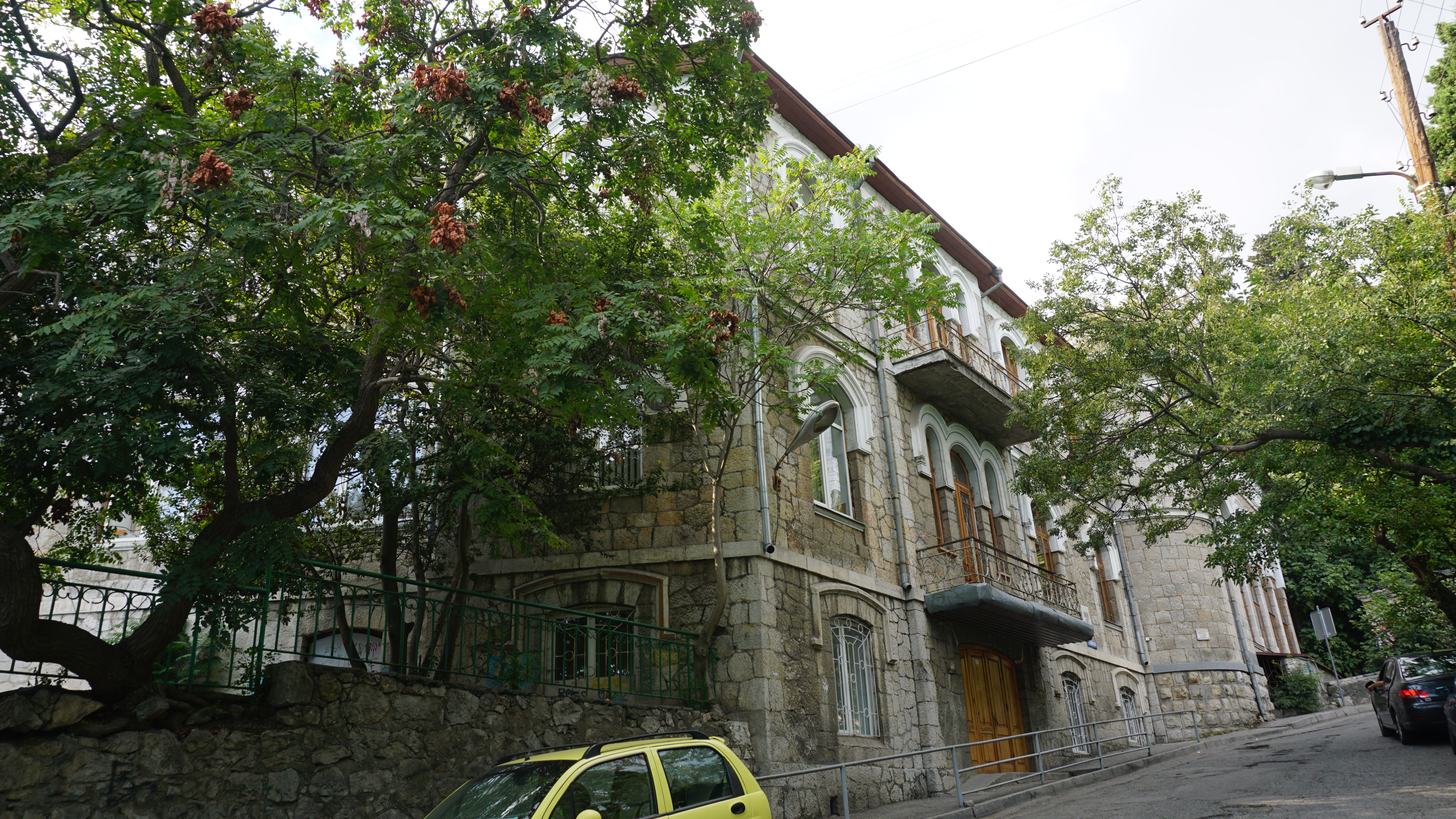 Здание женской гимназии, где А.П.Чехов был членом попечительского совета, 1891-1900: улица Войкова, 4, литер "А", Ялта, Крым This object is located on the Crimean Peninsula and recognized as cultural heritage by Russia under the monument ID: 8231511000. The legal status of the Crimean region is currently disputed.